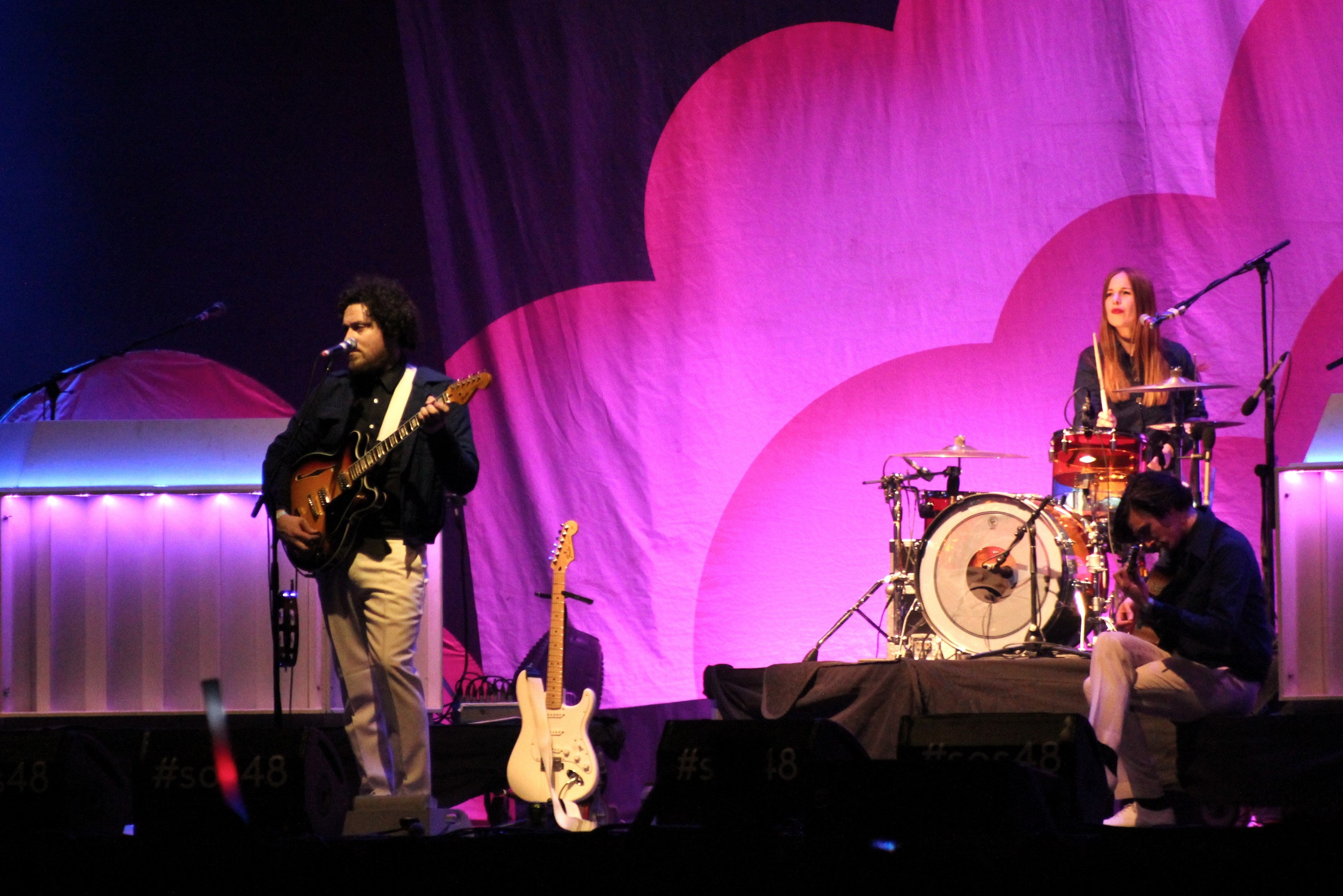 Metronomy es un grupo de música electrónica creado por Joseph Mount en Totnes, Devon, Inglaterra. Concierto en el Festival SOS 4.8 2015, en Murcia.